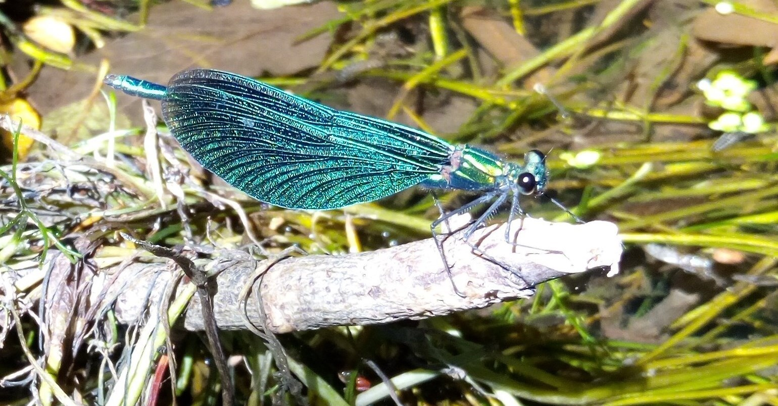 Blaue Libelle (Rhön)